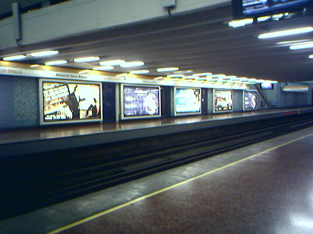 Estación Lo Ovalle (Linea 2) Santiago de Chile. Tomada con un celular motorola c650 a 640x480 pixeles